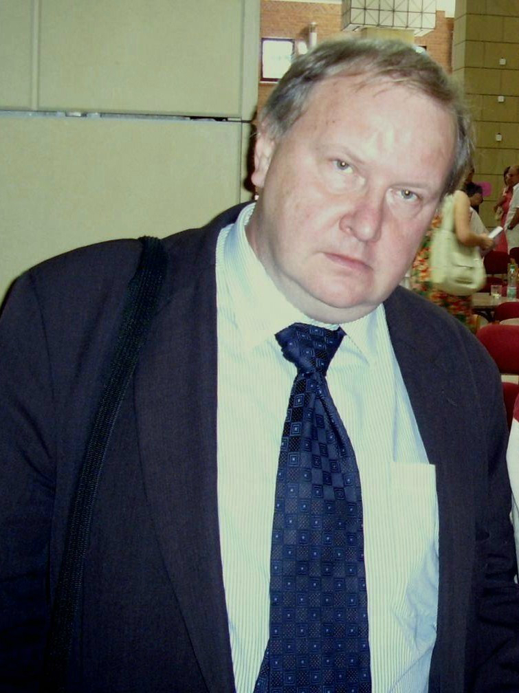 Aleksander Hall, gdański historyk i działacz polityczny.